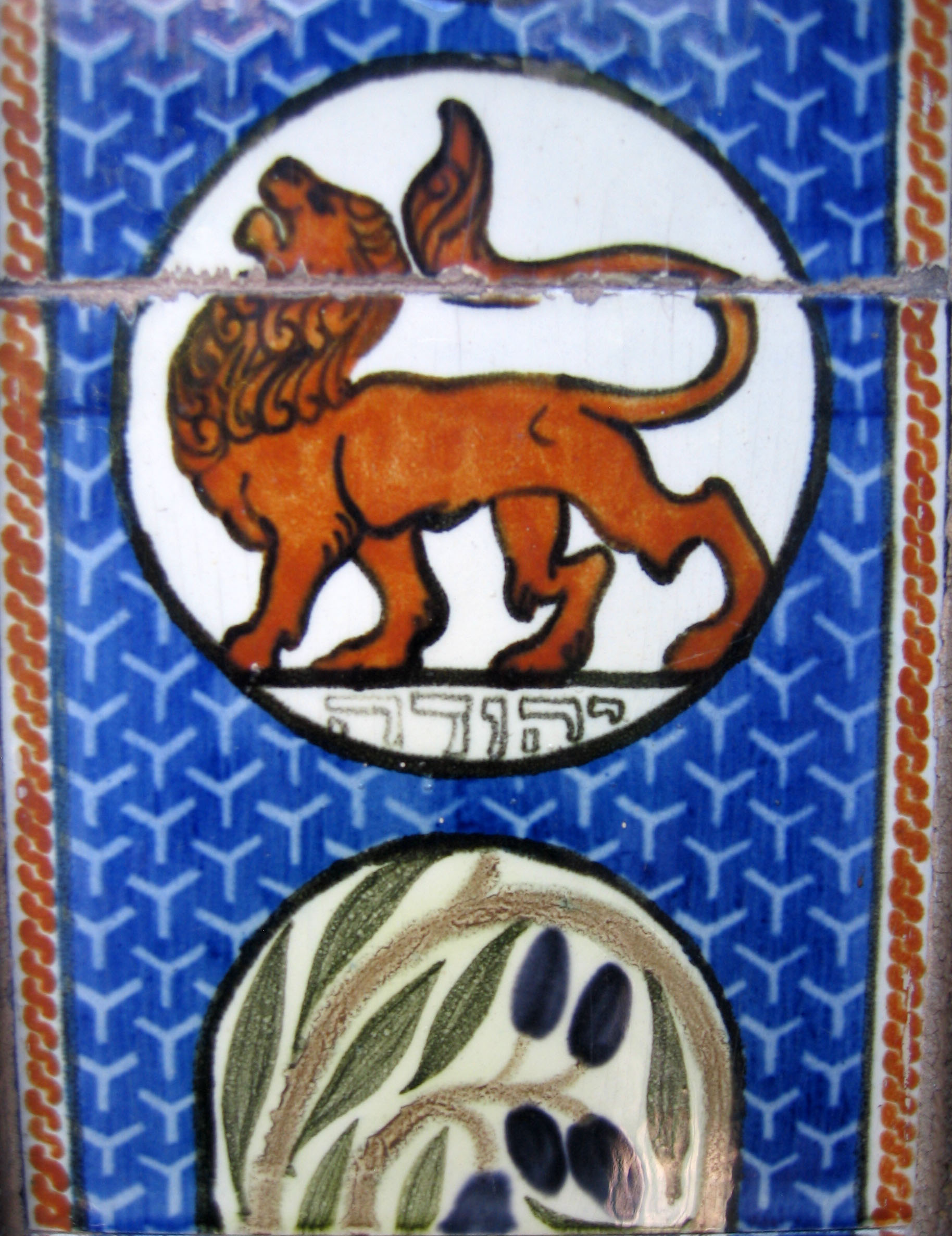 Mosav Zkenim Synagogue